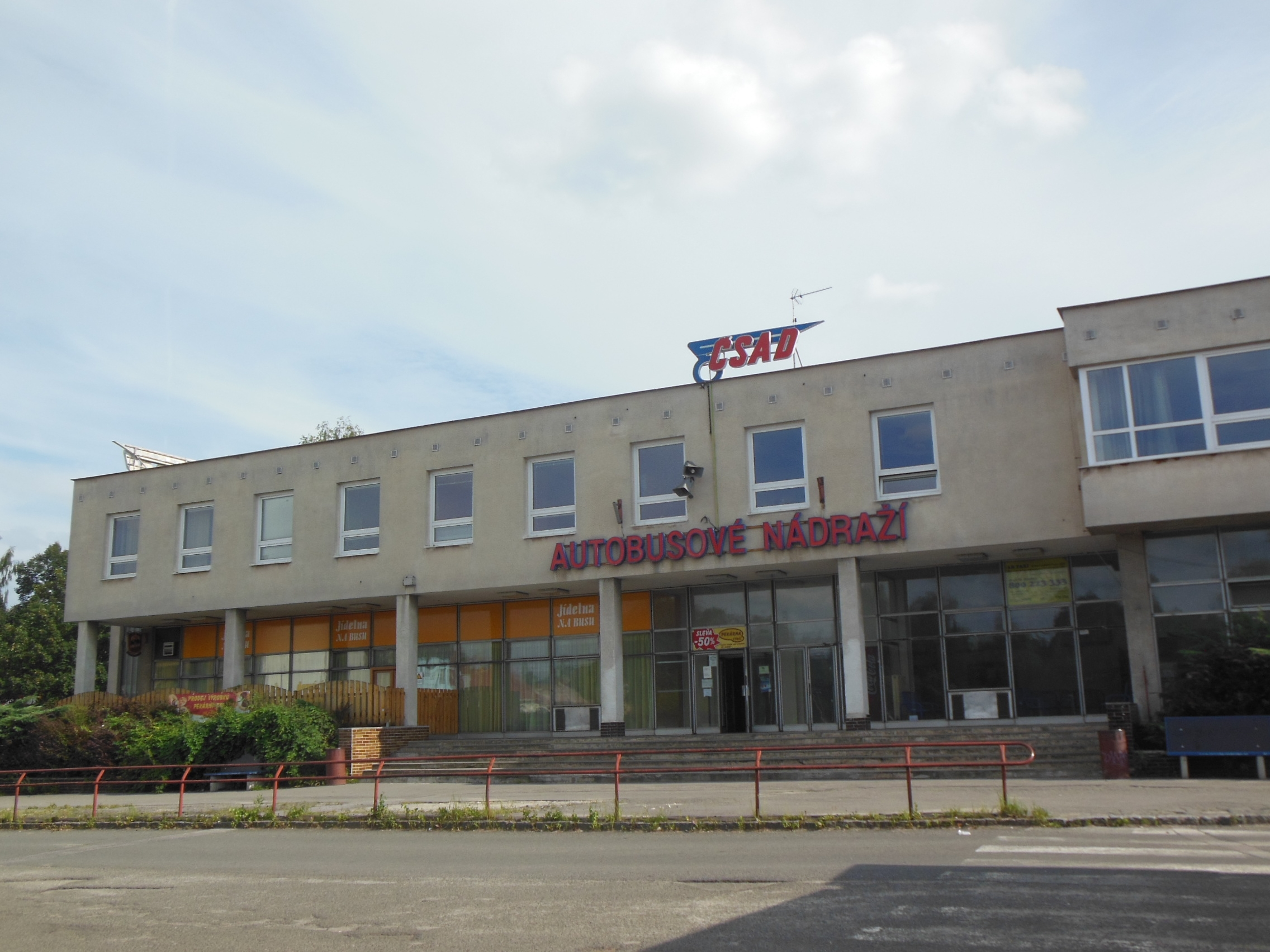 Česká Lípa (okres Česká Lípa). Ulice Konopeova, autobusové nádraží, budova č. p. 2723.